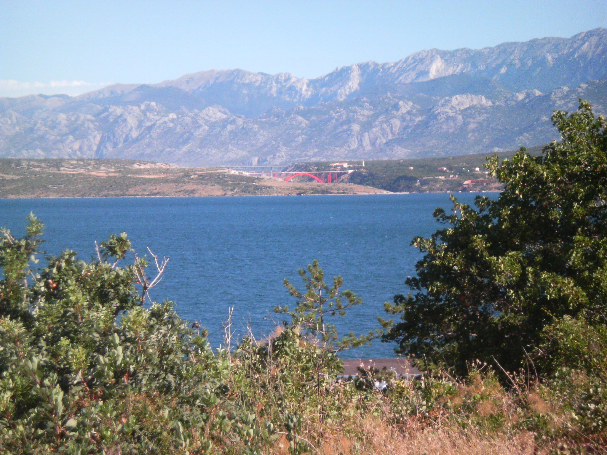 Maslenički mostovi und das Novigradsko more